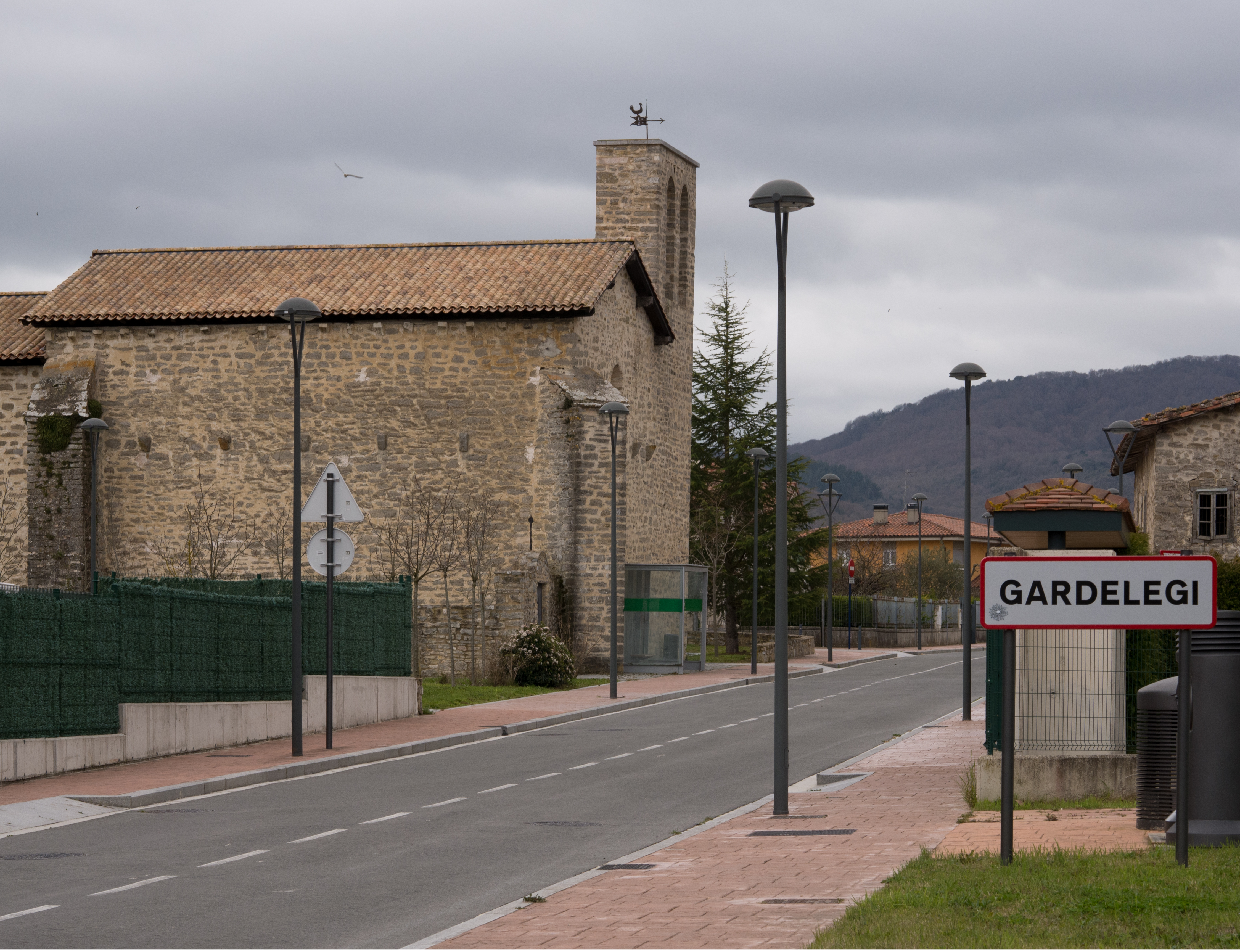 Barrio Gardelegi. Vitoria-Gasteiz, País Vasco, España